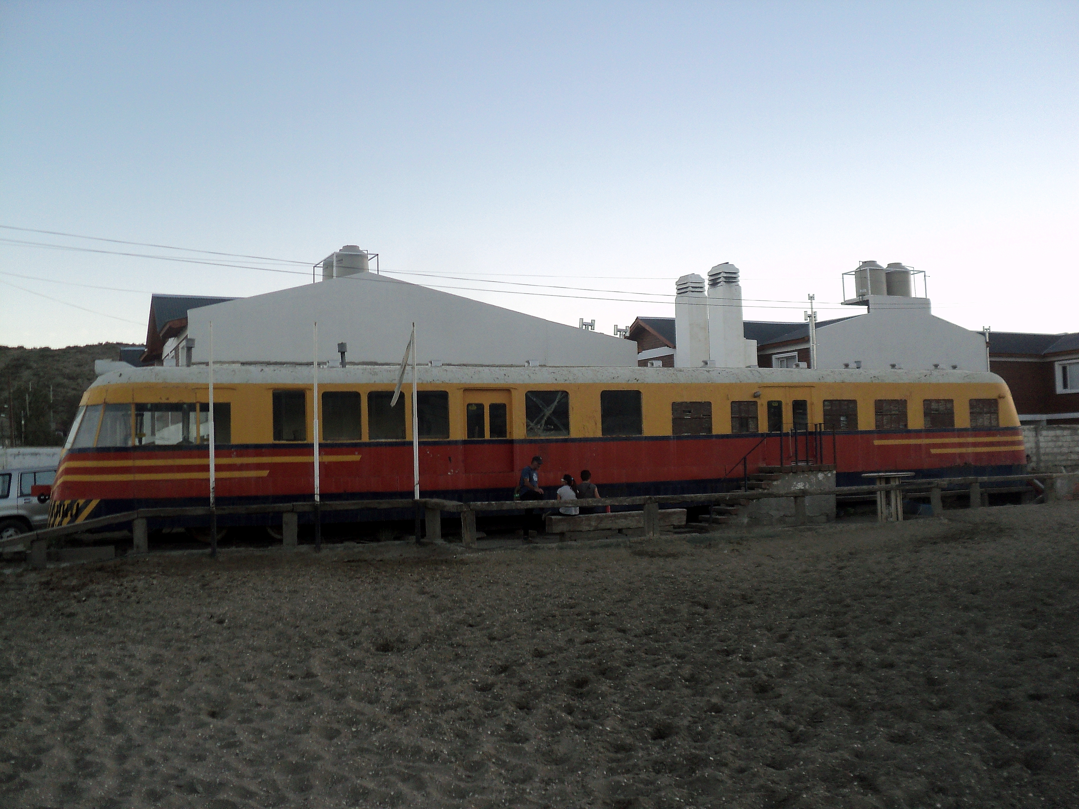 Coche motor Ganz en Rada Tilly, más precisamente en la escuela de equitación. Nótese su acceso modificado con una escalera hecha de durmientes. Es notorio el largo del coche lo que permitía llevar gran cantidad de pasajeros en viajes de larga distancia.